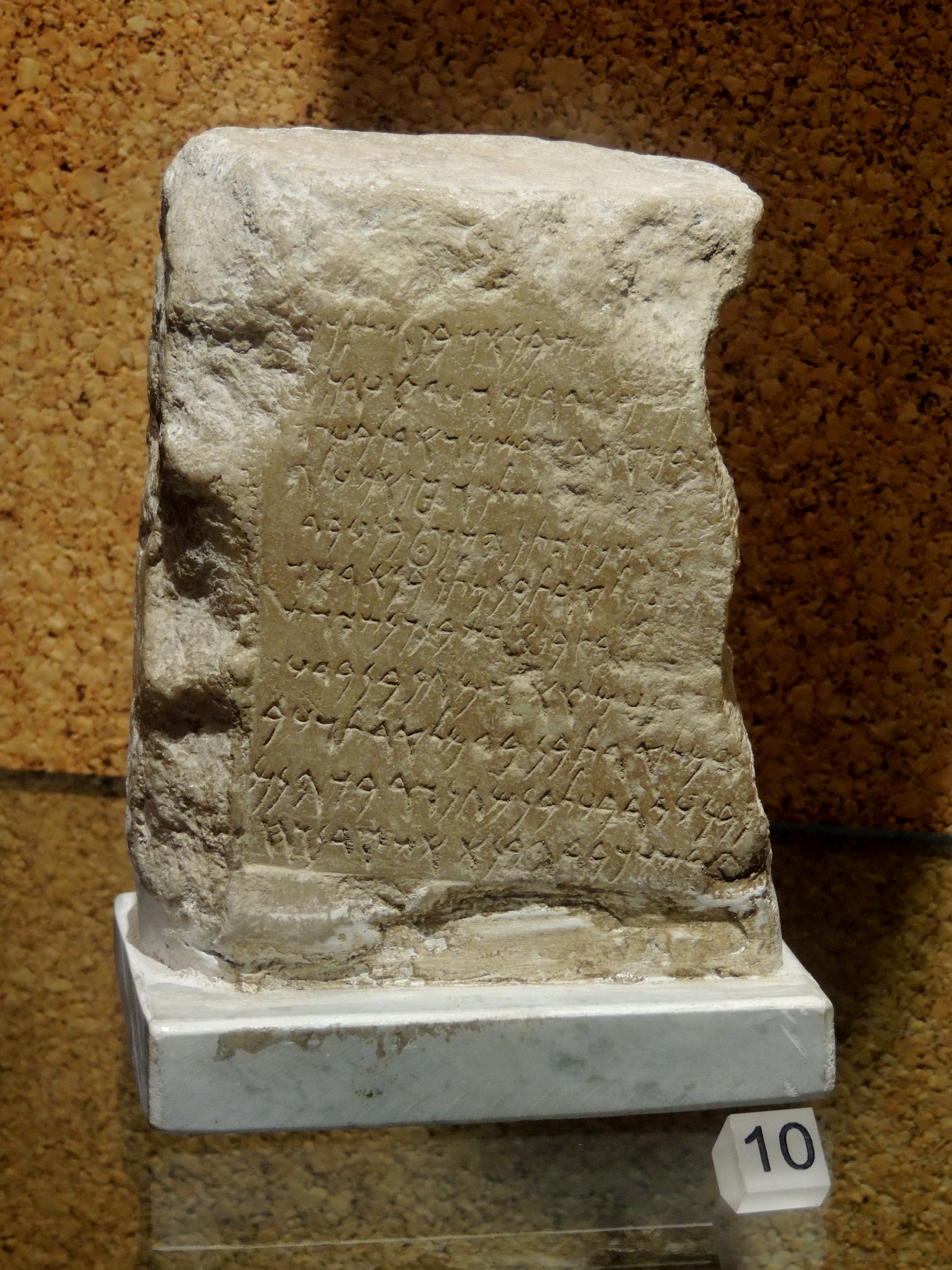 PUNIC ERA INSCRIPTION FROM CAGLIARI, esposta al Museo archeologico nazionale di Cagliari.